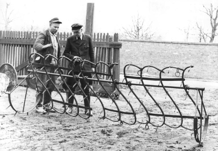 VEG Schönau, modifizierte Egge Illus Illner 17.2.51 Landarbeiter verbessern ihre Arbeit. Der älteste Landarbeiter des Volksgutes Schänau in Sachsen, der 58 jährige Aktivist Martin Rackelmann, konstruierte eine automatische Aushebevorrichtung für dreistellige Eggen, die Zeit und Arbeitskraft einspart, sowie Unfälle verhindern hilft. UBz: Martin Rackelmann (links) und der Schmied Ernst Wiewald diskutieren über die Verbesserung.